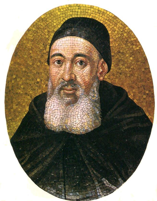 San Lazzaro degli Armeni est une petite île de la lagune de Venise, très proche du Lido. Elle est occupée par un monastère de l'ordre des Mékhitaristes depuis 1717. Le monastère comprend une bibliothèque de 200.000 volumes et manuscrits, un musée, une église, un cloître, des jardins et divers bâtiments. Ordre religieux arménien catholique fondé à Constantinople en 1700, établi en 1703 en Morée (Grèce) alors sous domination vénitienne par l’abbé Mekhitar de Sebaste (auj. Sivas) (1676 Sebaste-1749 Venise). En 1715, les mékhitaristes s’exilent à la suite de la conquête turque et s’établissent à Venise où, en 1717, la République sérénissime leur offre résidence sur l’île de San Lazzaro. De règle bénédictine, Mekhitar s’applique à donner à ses disciples un haut niveau d’éducation, portant une attention particulière au riche héritage culturel arménien. Il développe une intense activité d’édition. La branche autrichienne de l’Ordre reconnue à Trieste en 1773, puis déplacée à Vienne (Autriche) par Napoléon en 1810 est également dotée d’une maison d’édition. En 2000, Venise et Vienne ont fusionné, coïncidant avec le 300e anniversaire de l’Ordre, le 2000e anniversaire du christianisme et le 1700e anniversaire de l’adoption du christianisme par l’Arménie comme religion d’Etat. voir aussi le site sur les diasporas arméniennes [